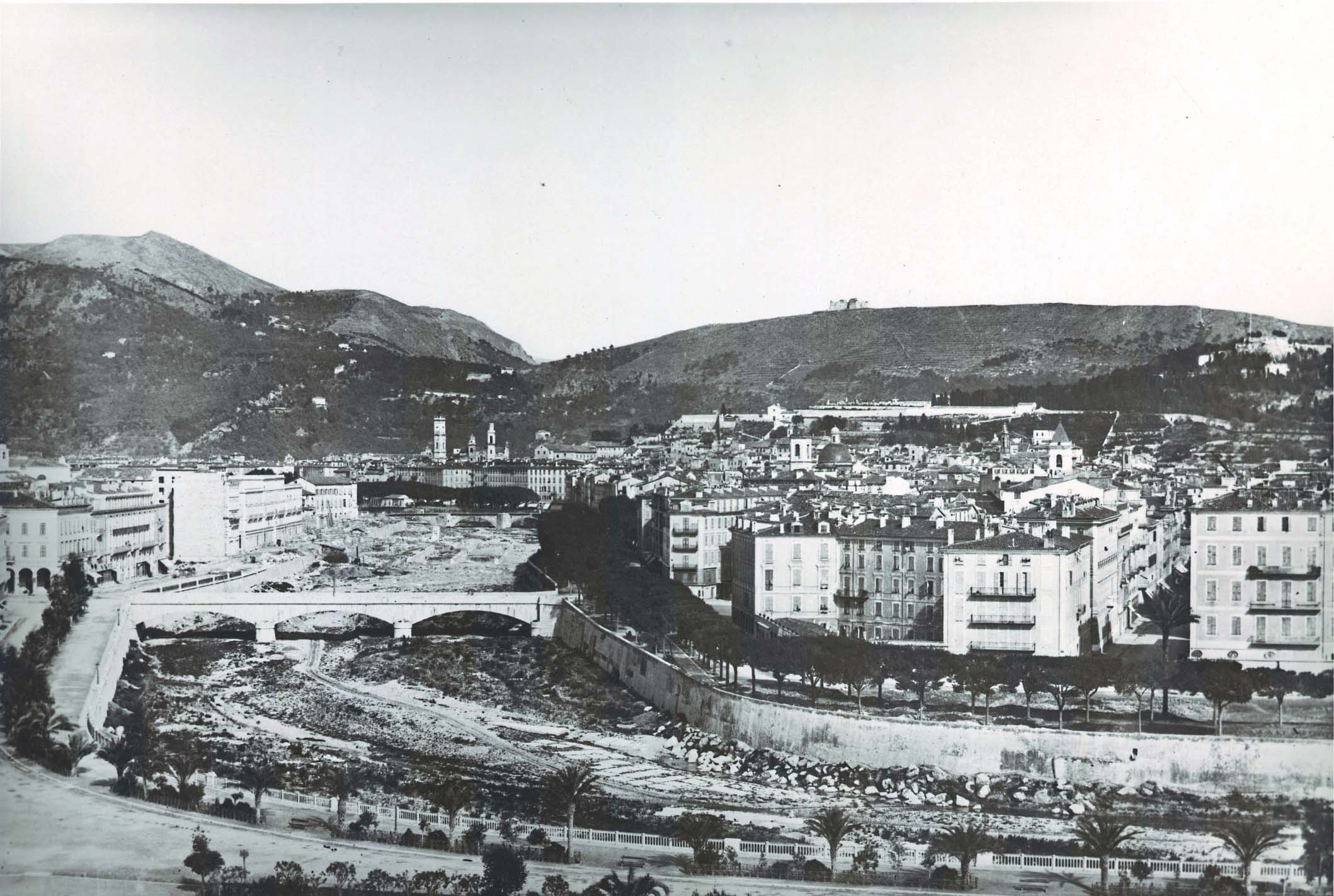 Quai du paillon, pont neuf et Mt Alban; Anonyme,1865